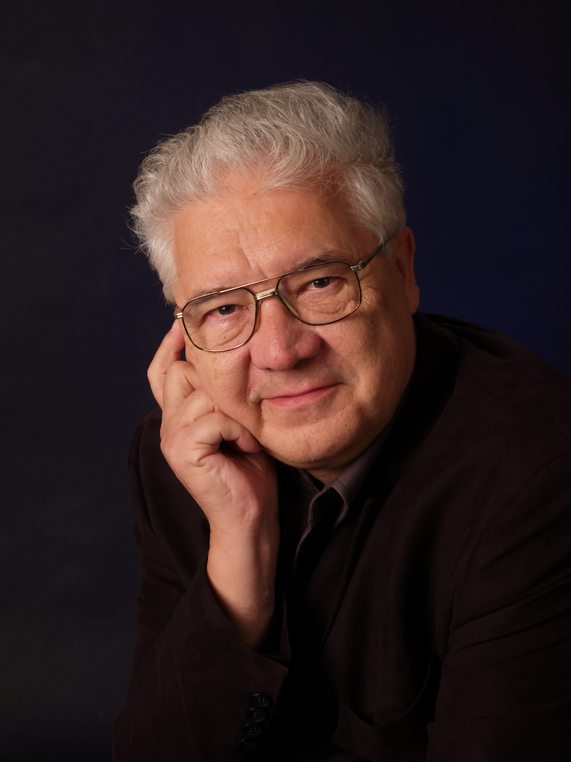 Porträt von Dietmar Schmeiser